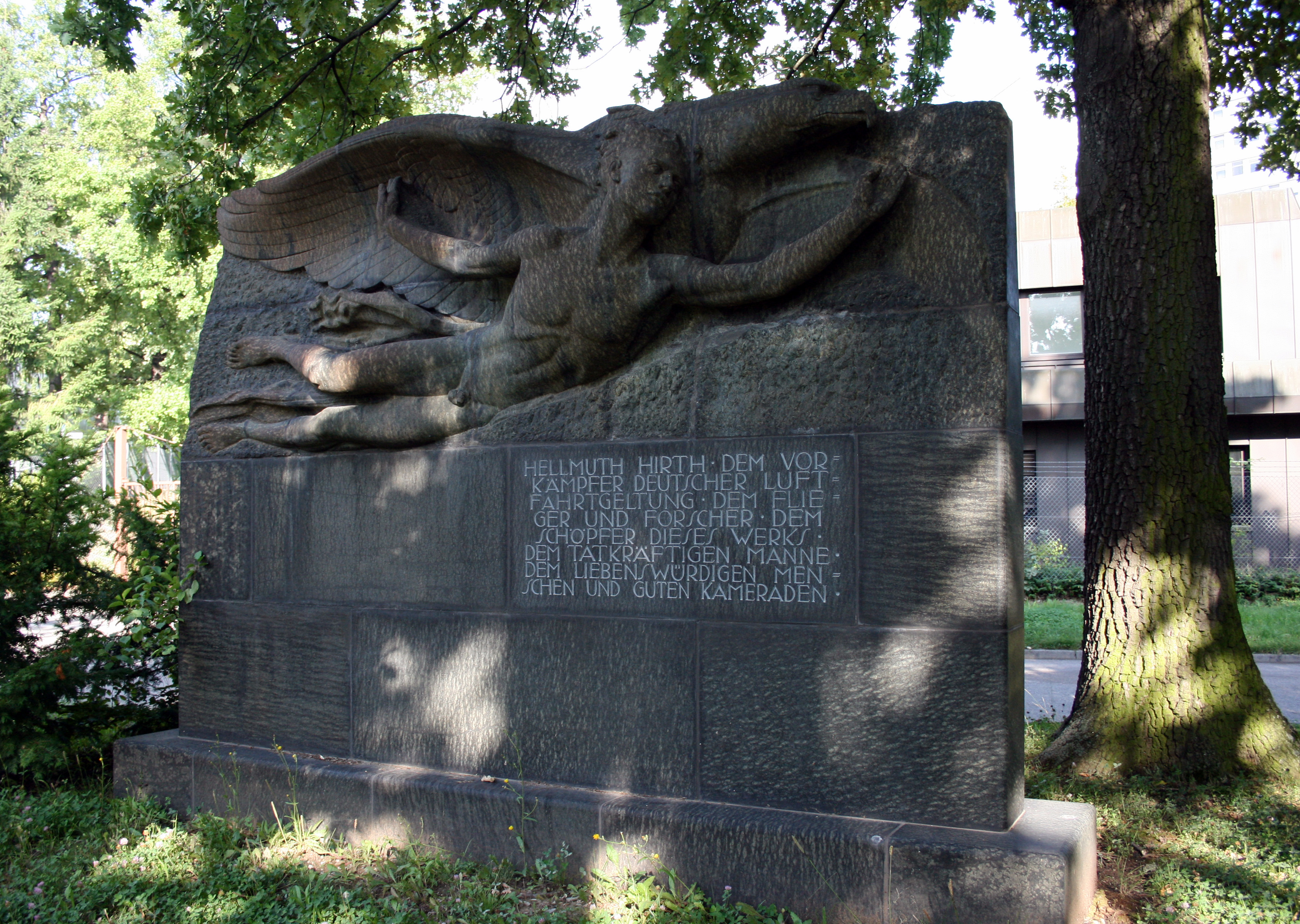 Denkmal des Flugpioniers Hellmuth Hirth in einer kleinen Grünanlage in Stuttgart-Zuffenhausen unweit seines ursprünglichen Werkes der „Hirth-Motoren GmbH" (Heute der Hauptsitz der Alcatel-Lucent Deutschland AG)